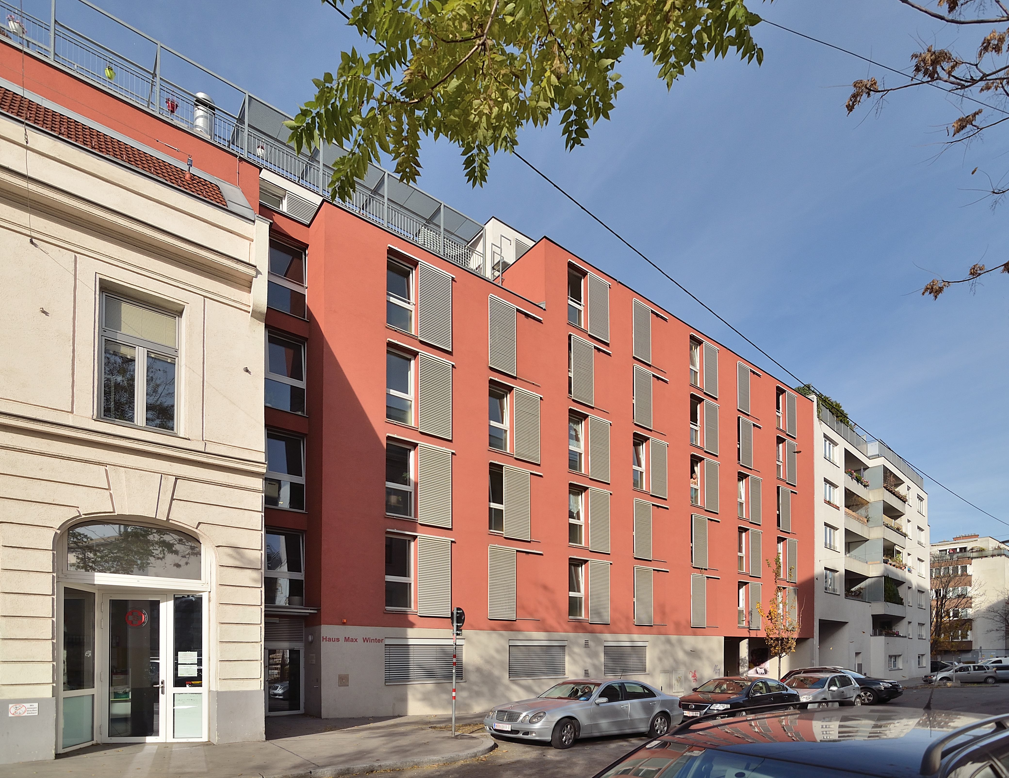 Das Haus Max Winter ist ein Wohnprojekt für ehemals Obdachlose in der Pillergasse 20 in Wien Rudolfsheim-Fünfhaus und wird von Samariterbund betrieben. Links daneben der ebenfalls vom Samariterbund betriebene Sozialmarkt.